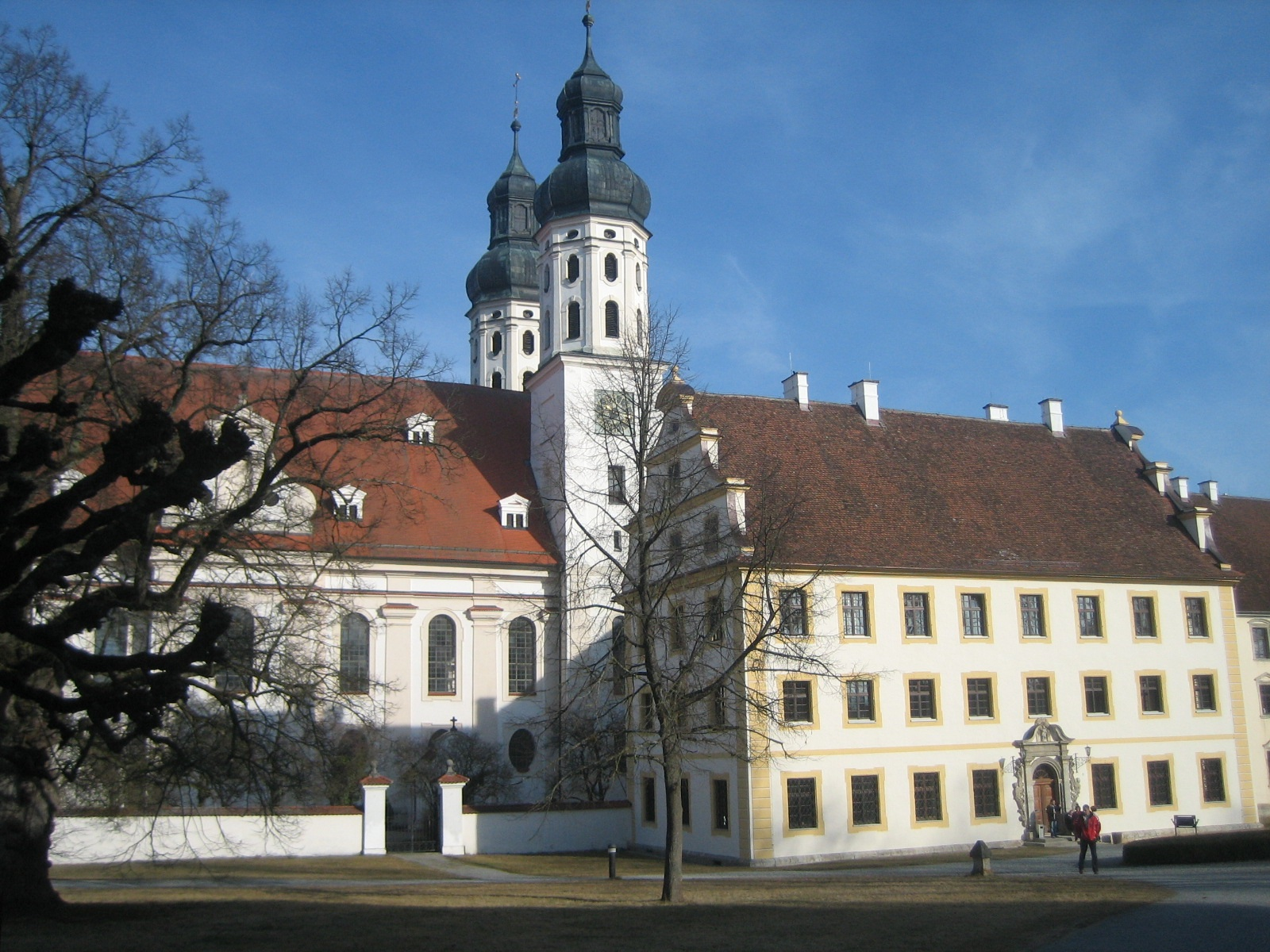 Kirche Obermarchtal